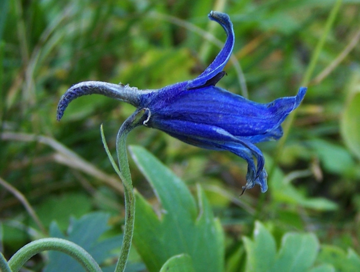 Delphinium oxysepalum (pl. ostróżka tatrzańska), habitat: Tatra Mountains, Czerwone Wierchy, Kobylarzowy Żleb